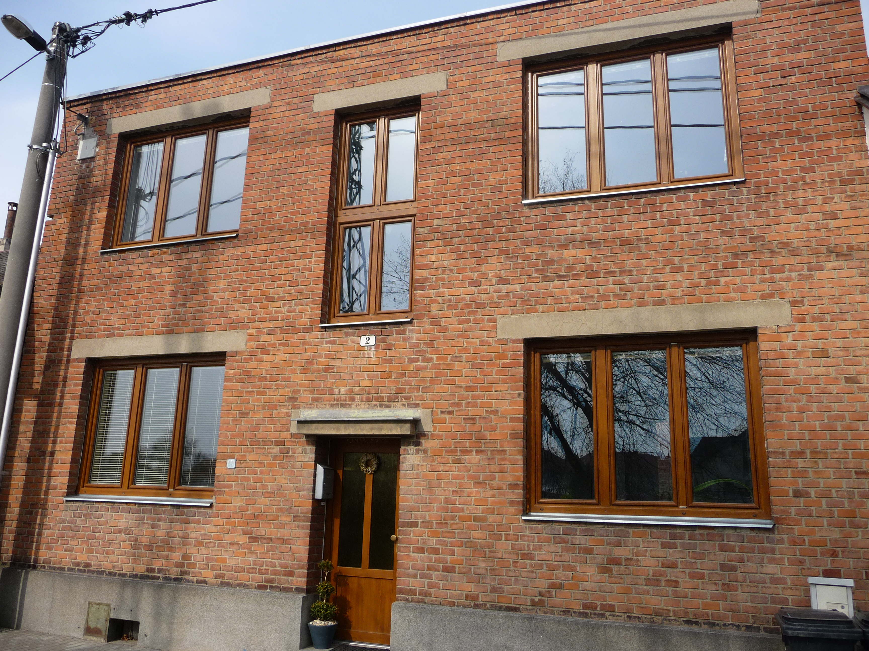 Dům č.p. 2 v rybárnách